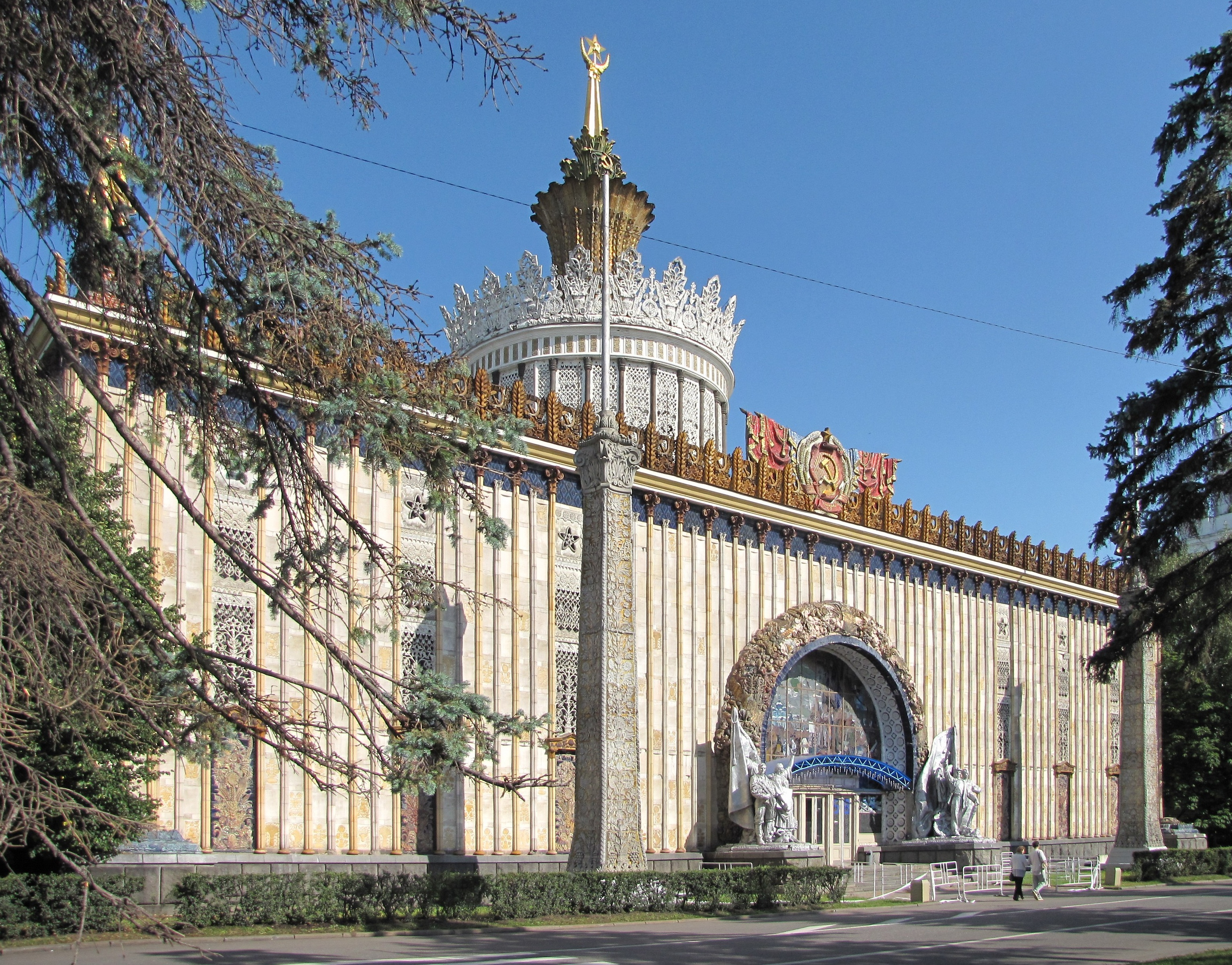 Вид на павильон Украинской ССР - центральный фасад по площади колхозов.